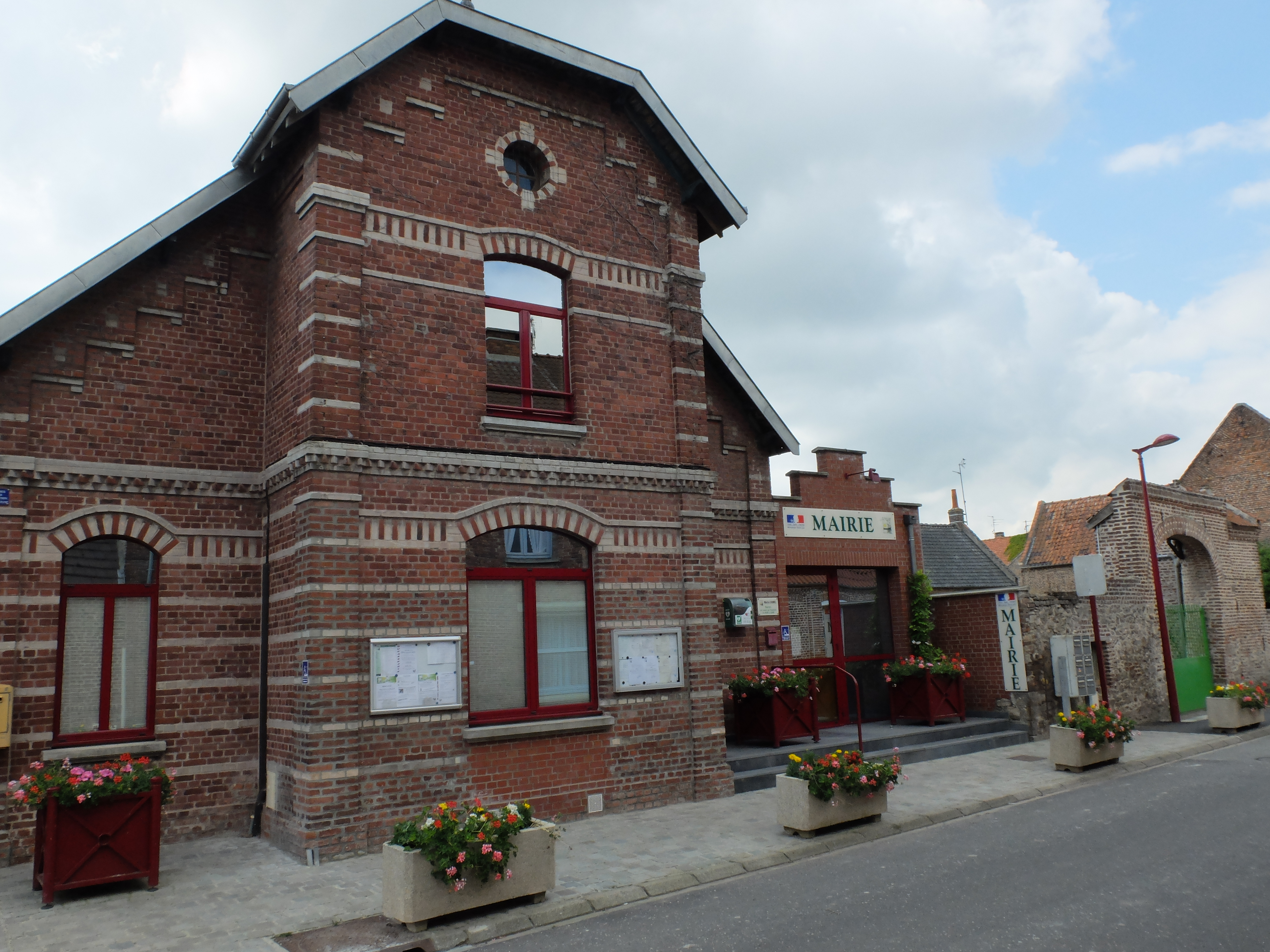 Vue de la mairie d'Hamel.